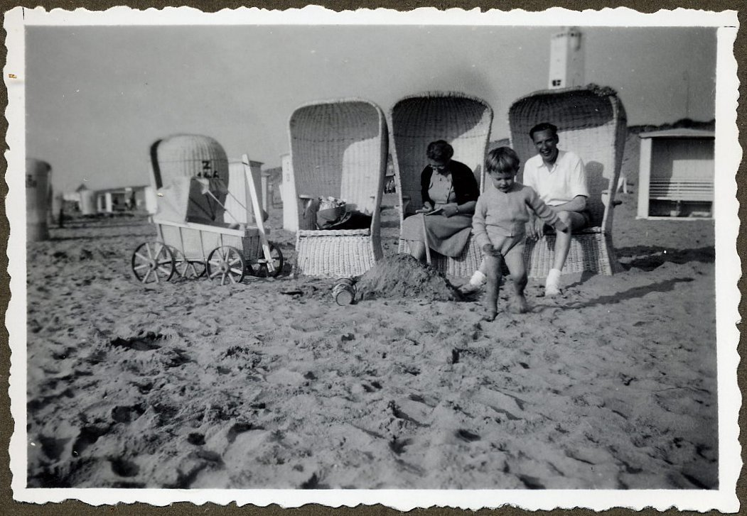 Rieten strandstoelen en boderwagen in Noordwijk aan zee